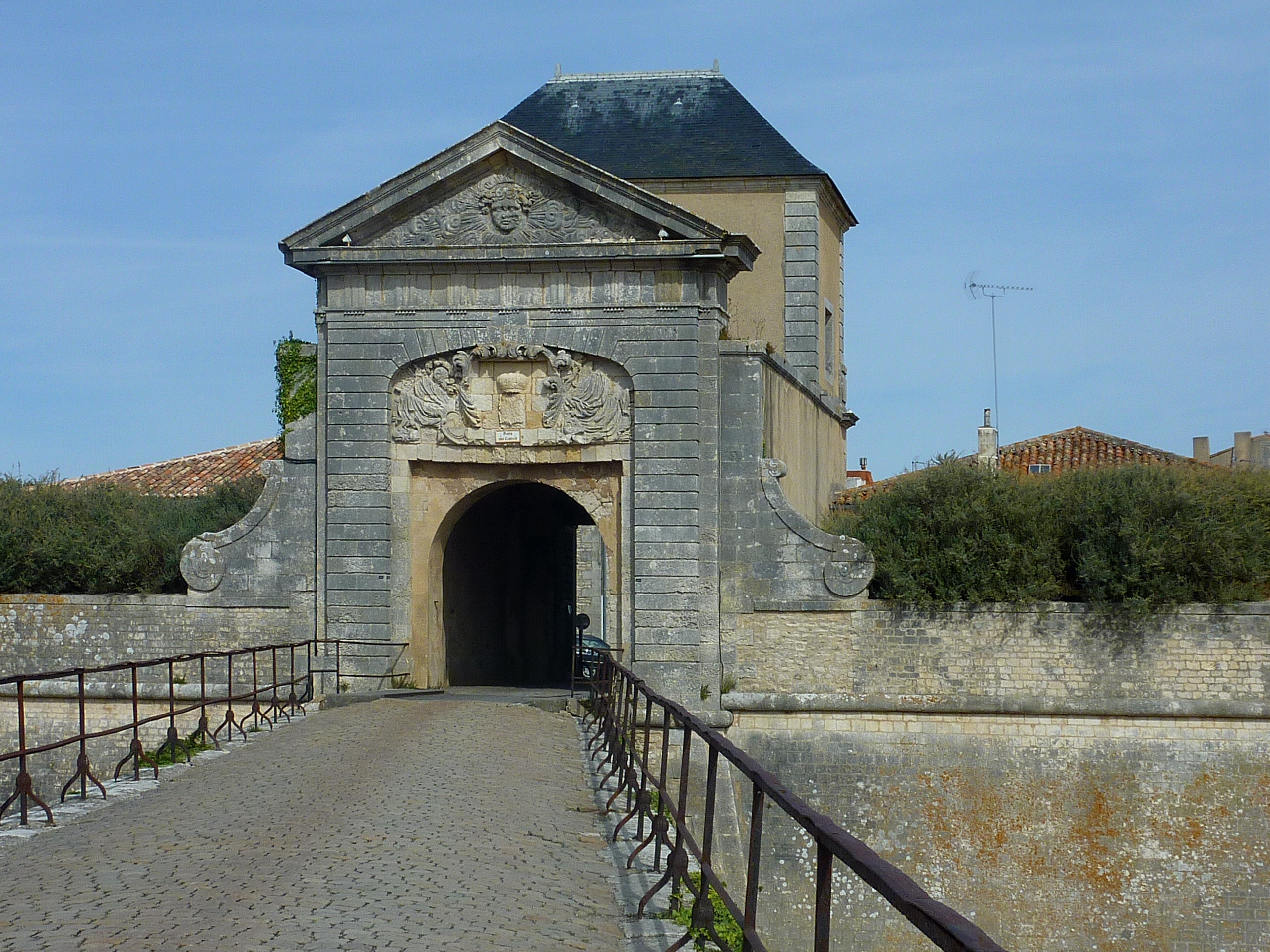 Porte des Campani dite Porte de la Couarde Saint--Martin-de-Ré charente Maritime France .